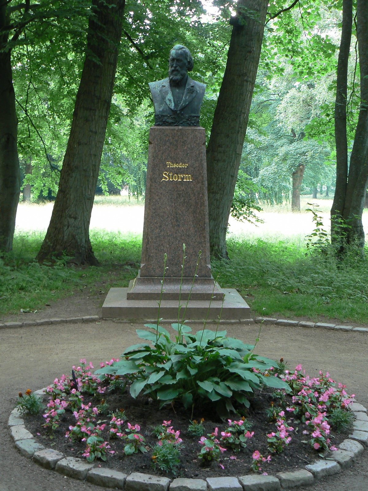 Theodor Storm Denkmalbüste in Husum. Bildhauer: Adolf Brütt, Enthüllung: 14. September 1898, Material: Bronze, Standort: Schlosspark (Eingang beim Schloss).